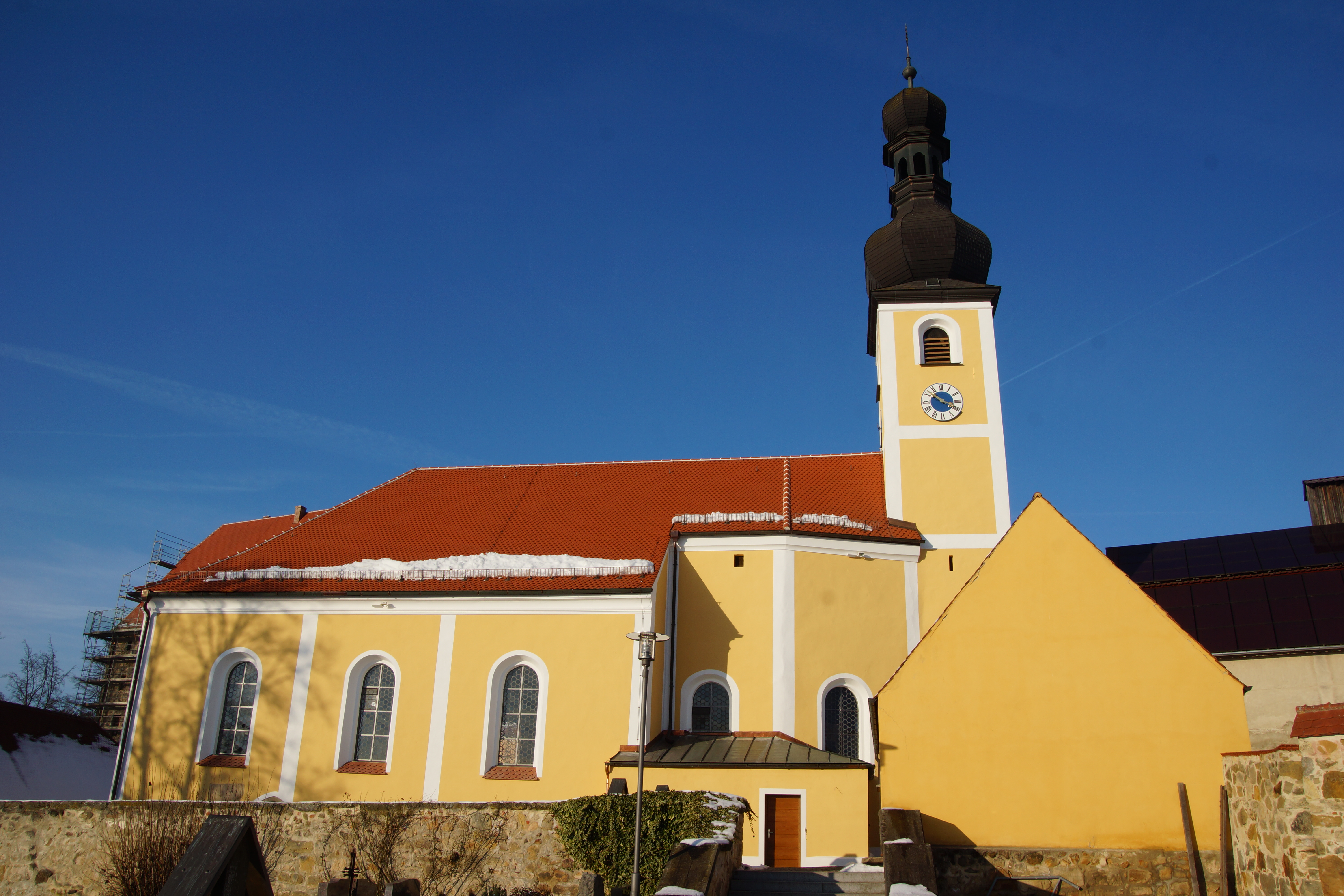 Die Pfarrkirche St. Michael in Wolfring in der Oberpfalz